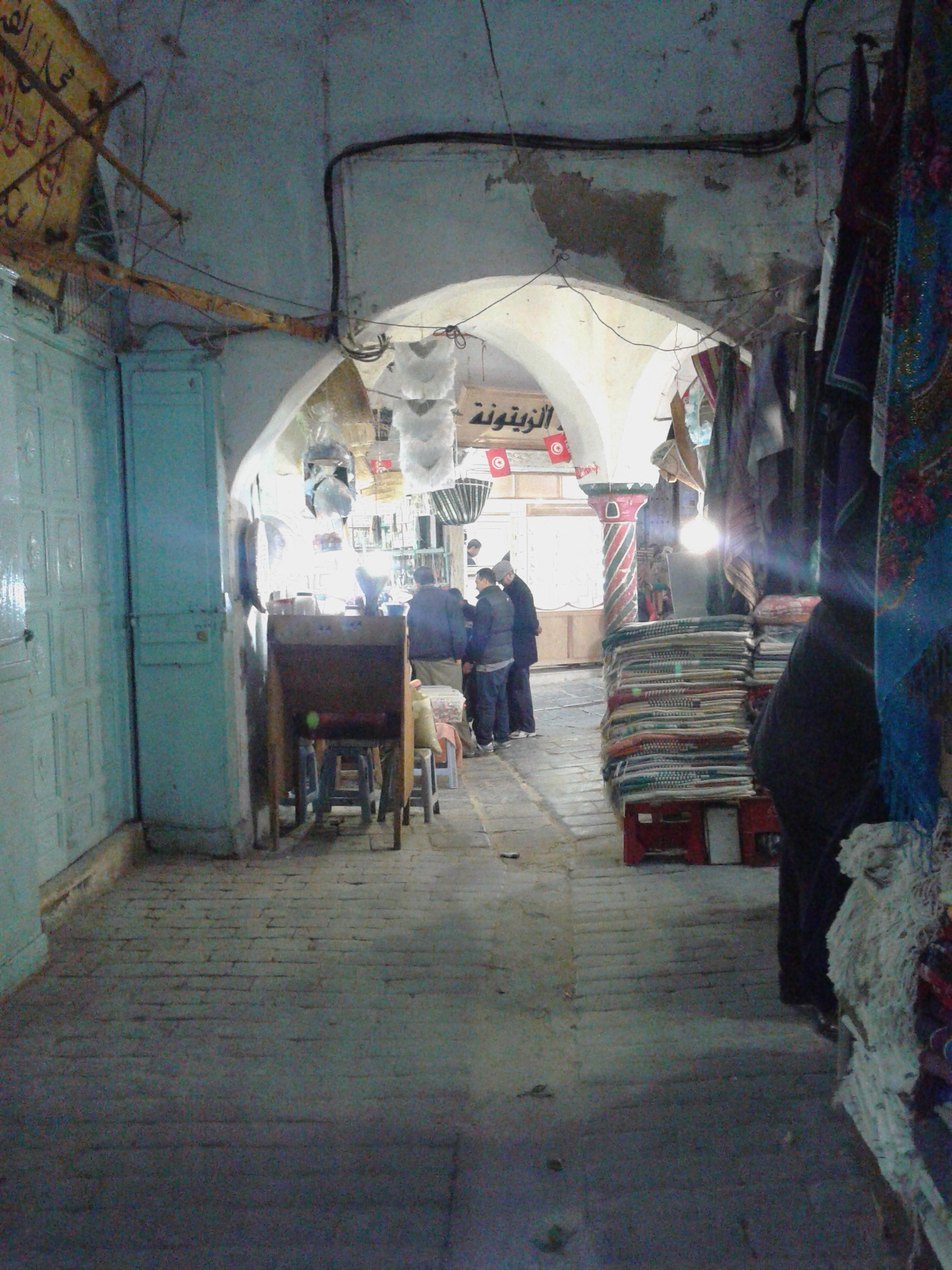 Souk el blaghjiyya